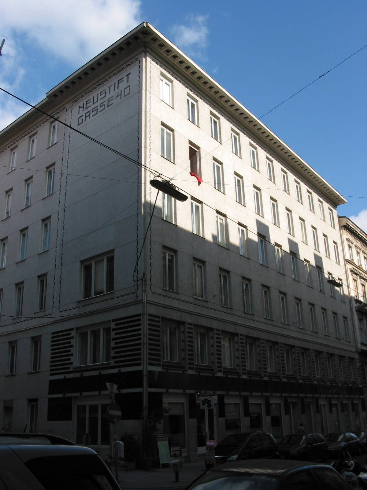 Wohnhaus von Otto Wagner in der Neustiftgasse, Vienna VII, 2005-10-16 selfmade photo